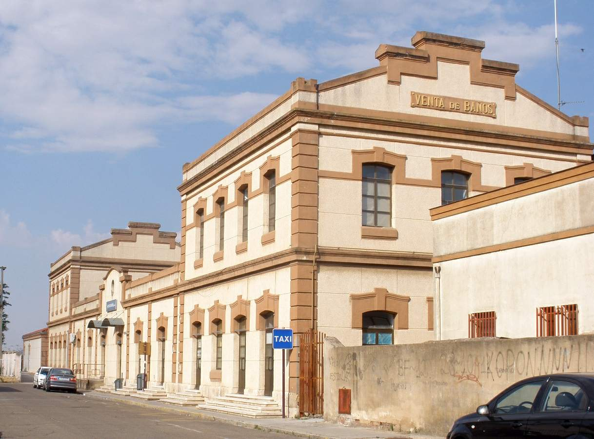 Estación de ferrocarril de Venta de Baños (Palencia)